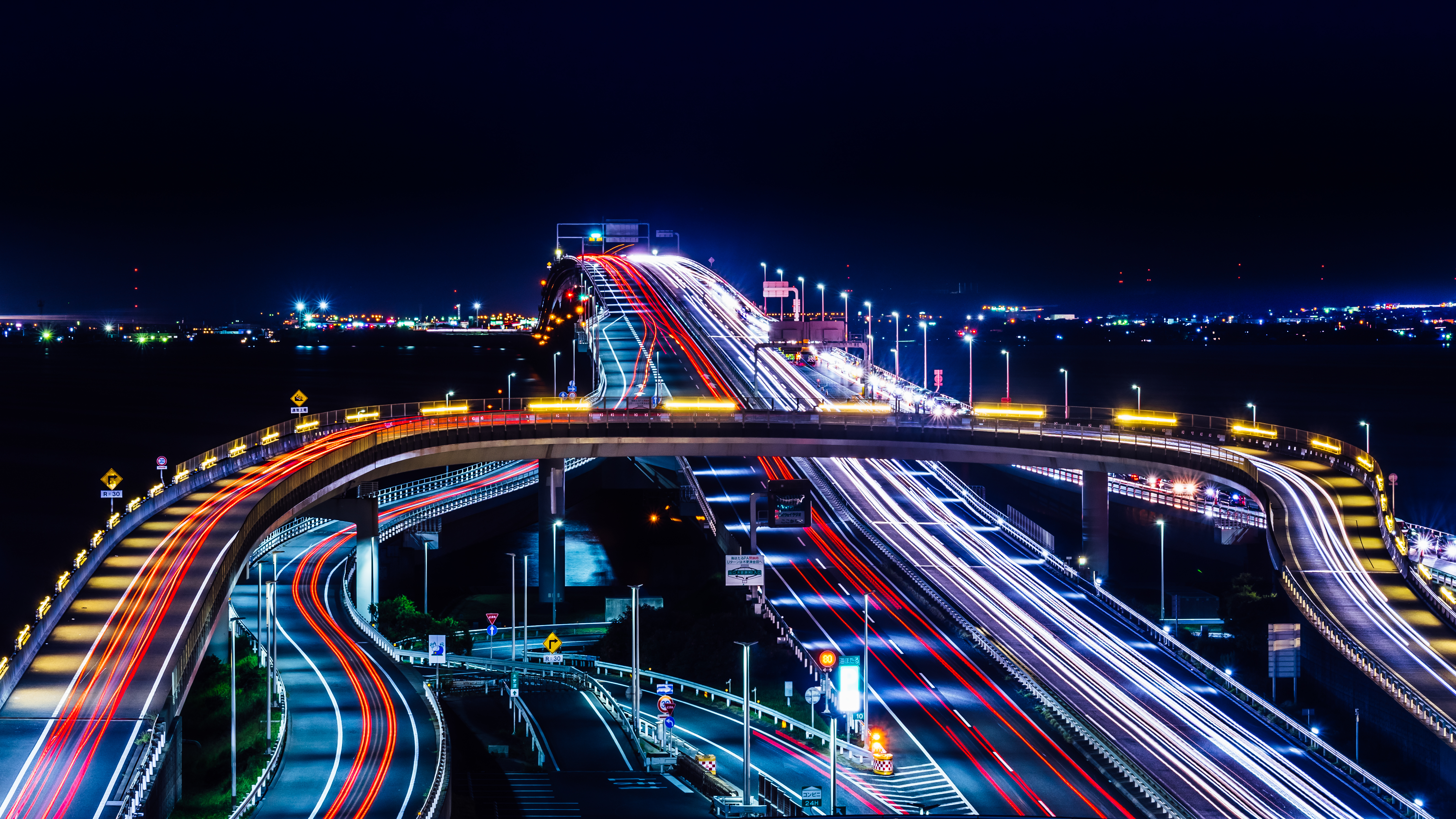 taken at at Umihotaru Parking Area, Chiba, Japan